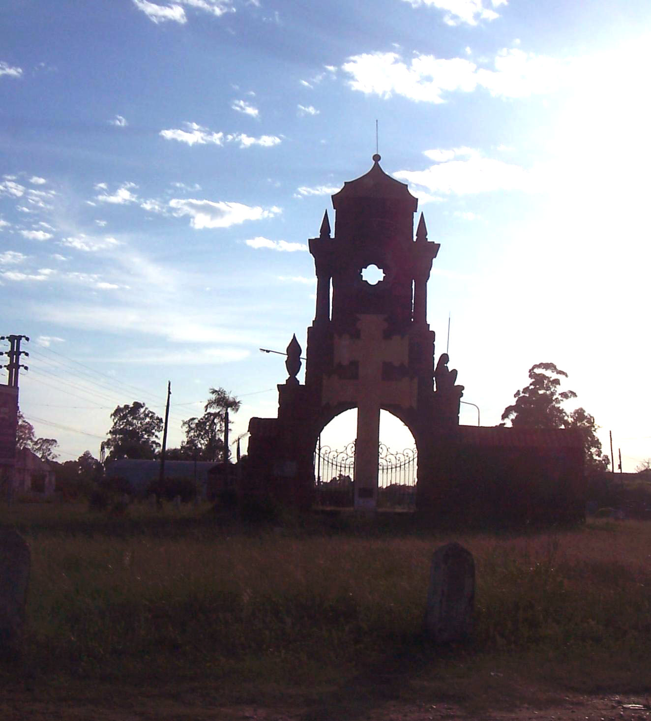 Entrada a la ciudad de Santo Tomé, sobre la ruta Nacional 14. Se puede observar la cruz jesuítica.